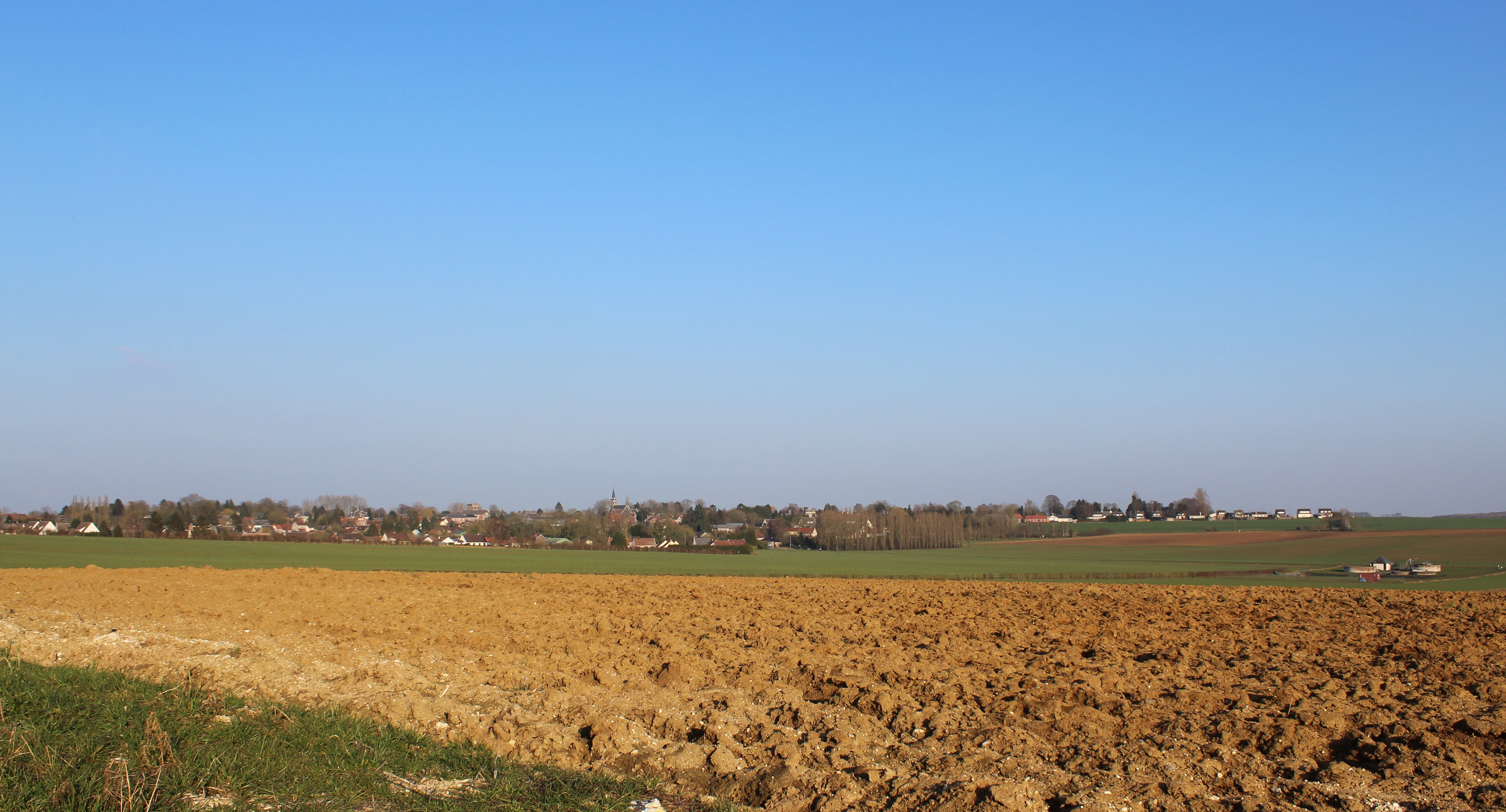 Panorama du village.